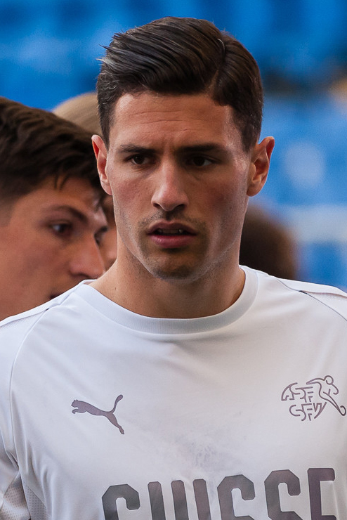 Бразилия и Швейцария готовятся к очной встрече на «Ростов Арене»